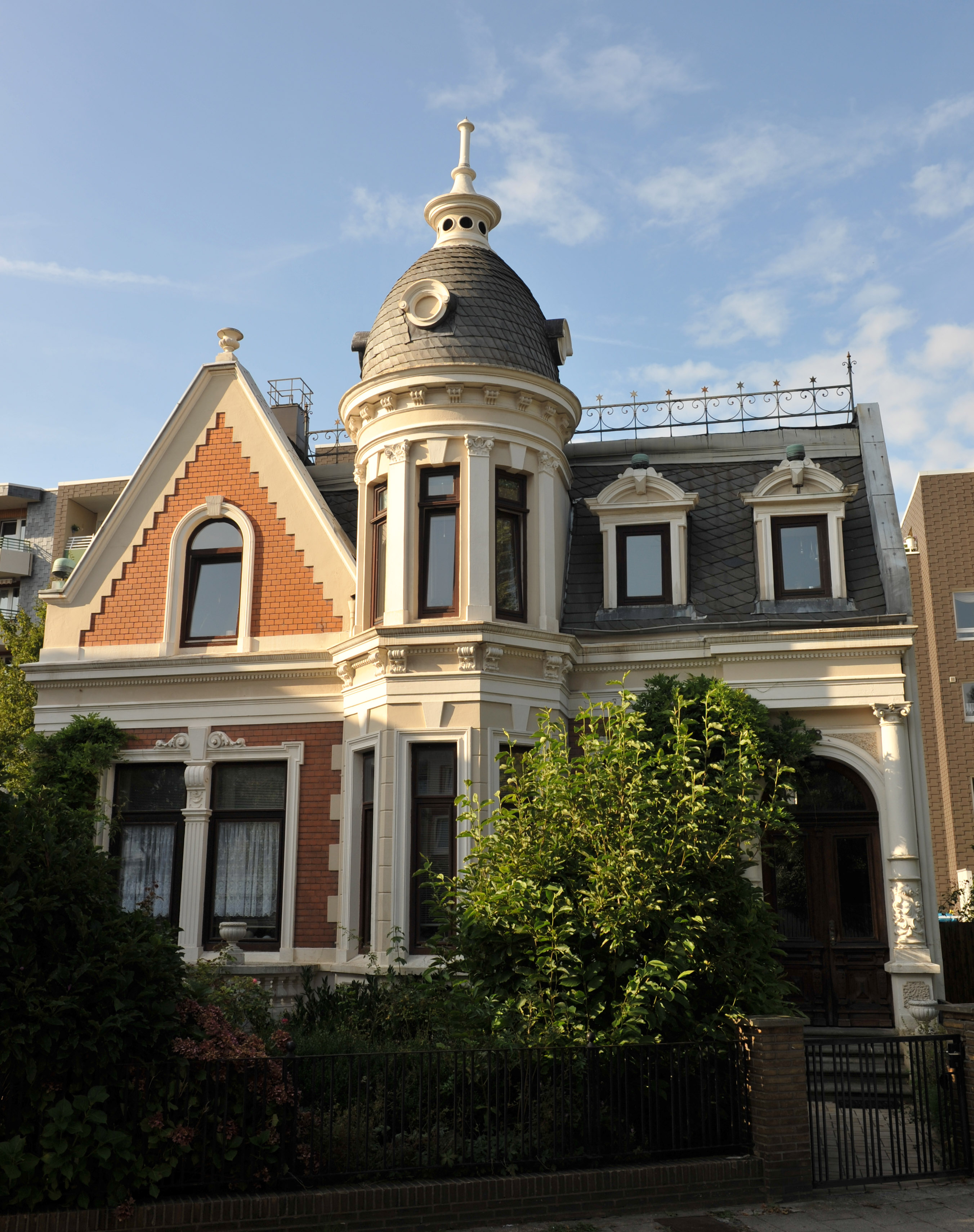 Historical building in Bremerhaven, northern Germany Villa Hansen, Krumme Straße 18, 1898 von Carl Pogge Das abgebildete Objekt ist ein geschütztes Kulturdenkmal in der Freien Hansestadt Bremen, mit der Nr. 1575 beim Landesamt für Denkmalpflege registriert.